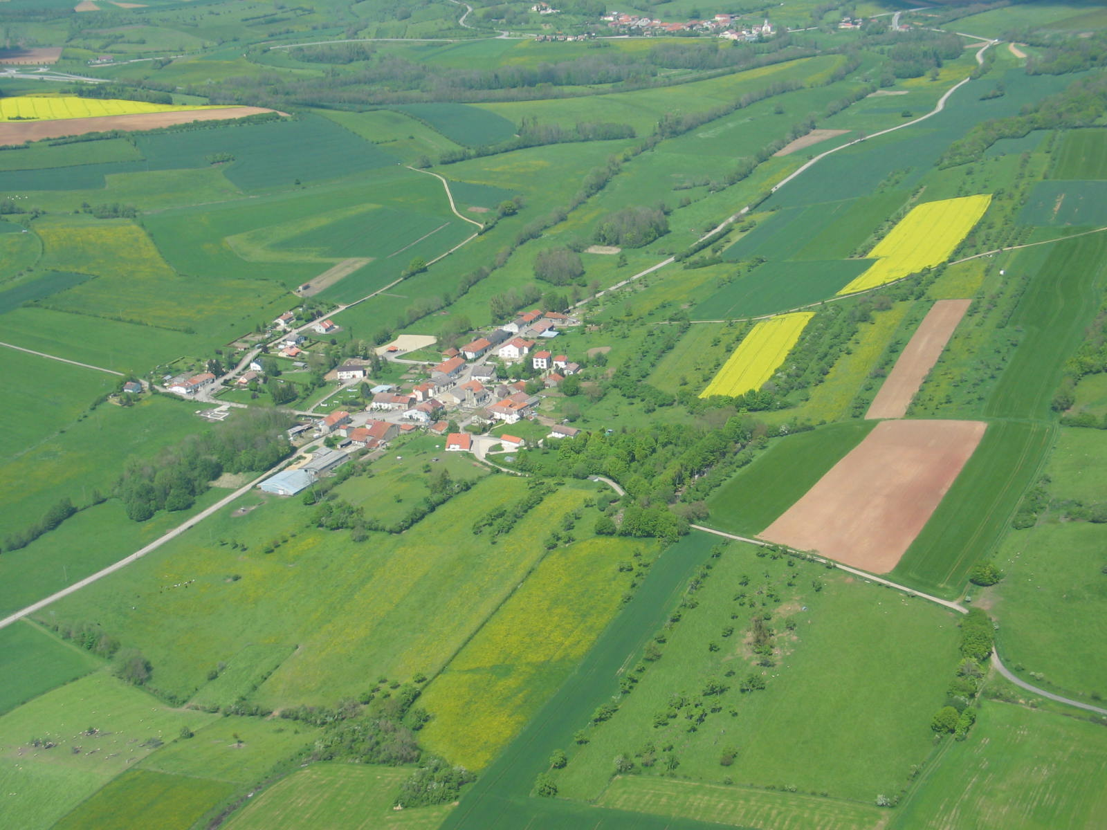 Vue aérienne sur la partie bourg de Thiraucourt.